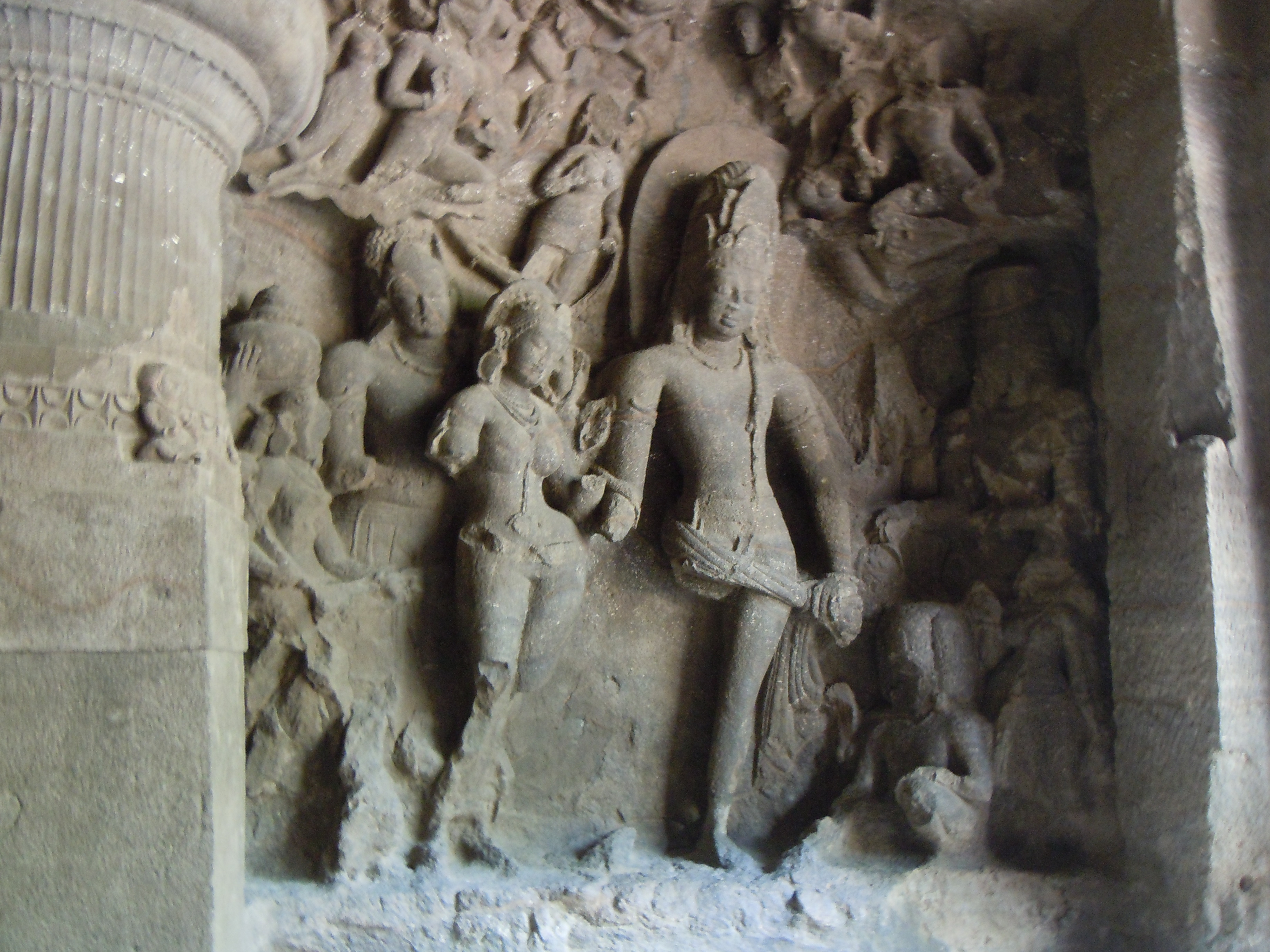 Grottes d'Elephanta - Mariage de Shiva et Parvati